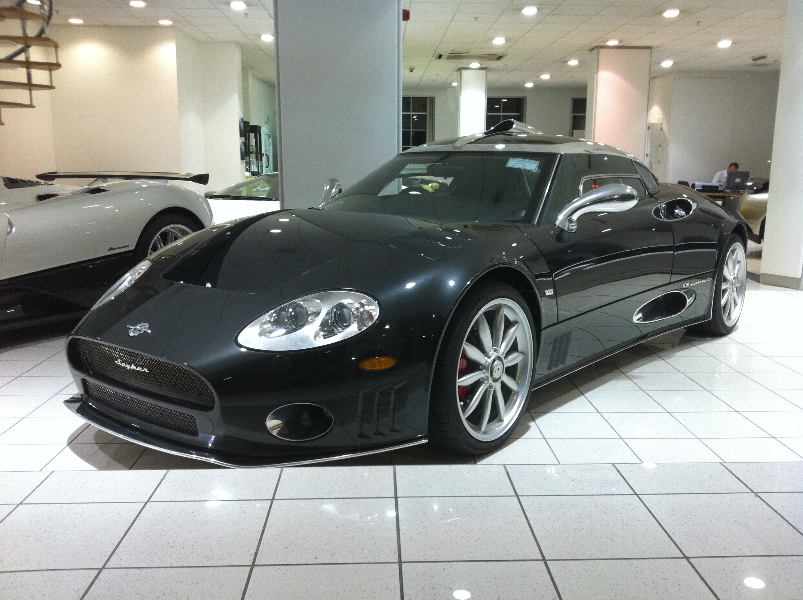 Spyker, Park Lane, London